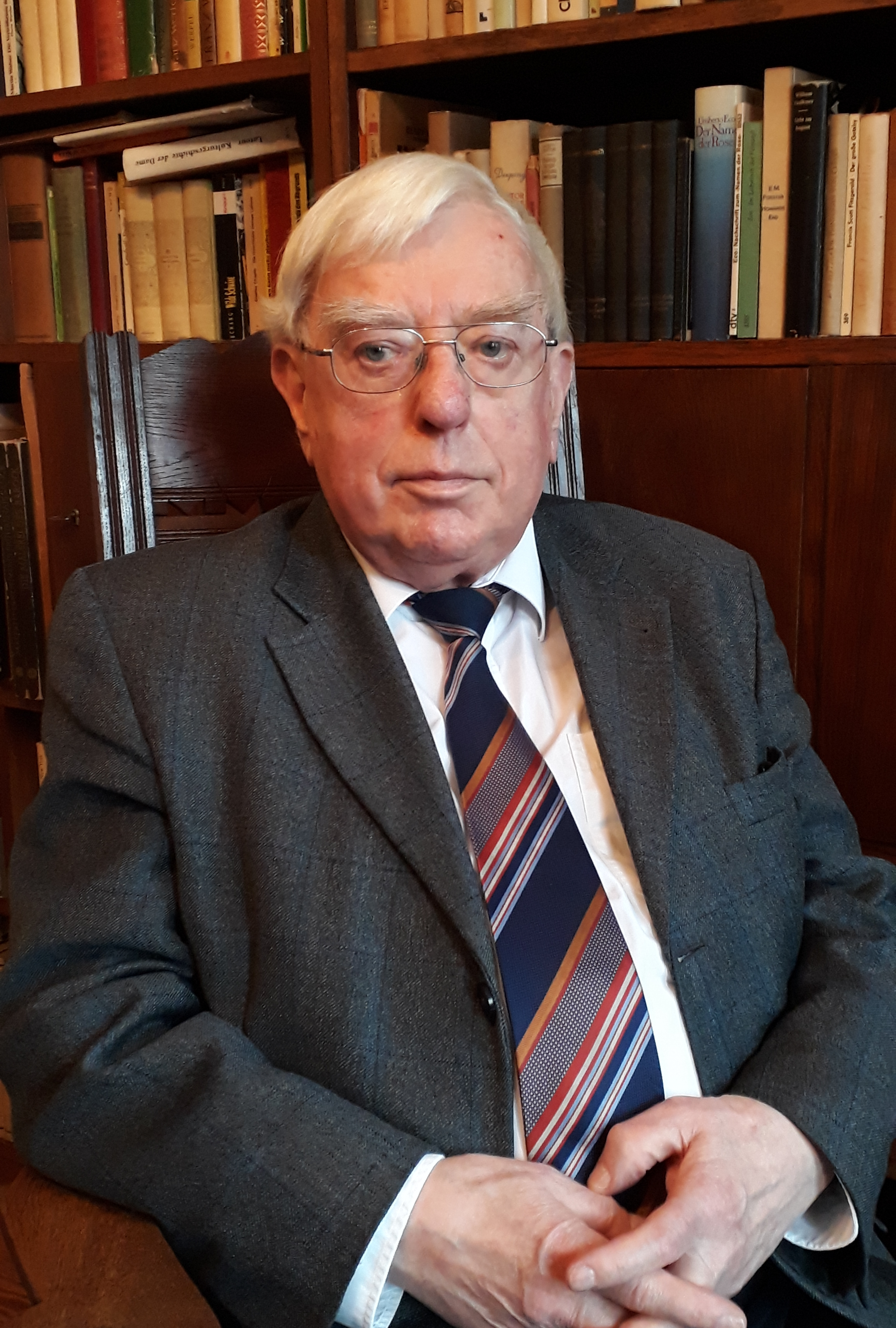 Porträt von Hermann Paul ArnoldDepicted person: Paul Arnold – German numismatist